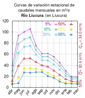 Curvas de variación estacional del río Liucura en Liucura. # Dirección General de Aguas # Diagnóstico y clasificación de los cursos y cuerpos de agua según objetivos de calidad. Cuenca del río Toltén. # Santiago de Chile # Ministerio de Obras Públicas (Chile) # 2004 # url: # urlarchivo: # Tabla 4.6: Río Liucura en Liucura (m3/s), pág. 46 mes 5% 10% 20% 50% 85% 95% abr 39.50 29.34 20.89 11.87 7.21 5.97 may 93.45 78.26 62.42 38.50 17.26 7.62 jun 100.25 86.71 72.73 51.97 34.36 26.95 jul 105.44 90.47 75.15 52.70 34.05 26.34 ago 75.24 67.44 59.06 45.83 33.54 27.92 sep 60.90 55.06 48.98 39.79 31.63 27.92 oct 61.54 55.64 48.90 37.46 26.00 20.55 nov 55.19 48.45 41.38 30.61 21.12 16.98 dic 44.60 38.58 32.31 22.85 14.44 10.62 ene 29.60 25.50 21.23 14.79 9.06 6.46 feb 19.59 17.32 14.94 11.36 8.17 6.73 mar 19.02 15.84 12.91 9.27 6.91 6.13 This plot was created with Gnuplot.